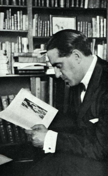 Gregorio Marañón en la revista Caras y Caretas 17/01/1931, n. 1685, página 61. "El doctor Gregorio Marañón refugiado en un rincón de su biblioteca."